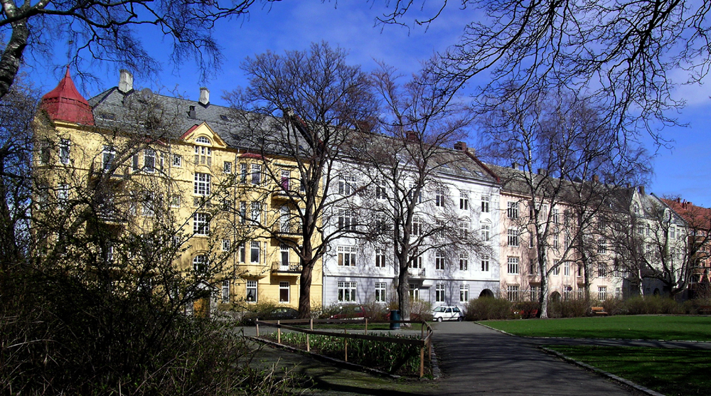 Museumsplassen, Trondheim. Sett mot Hans Hagerups gate. Leiegårder bygd 1909-1910.